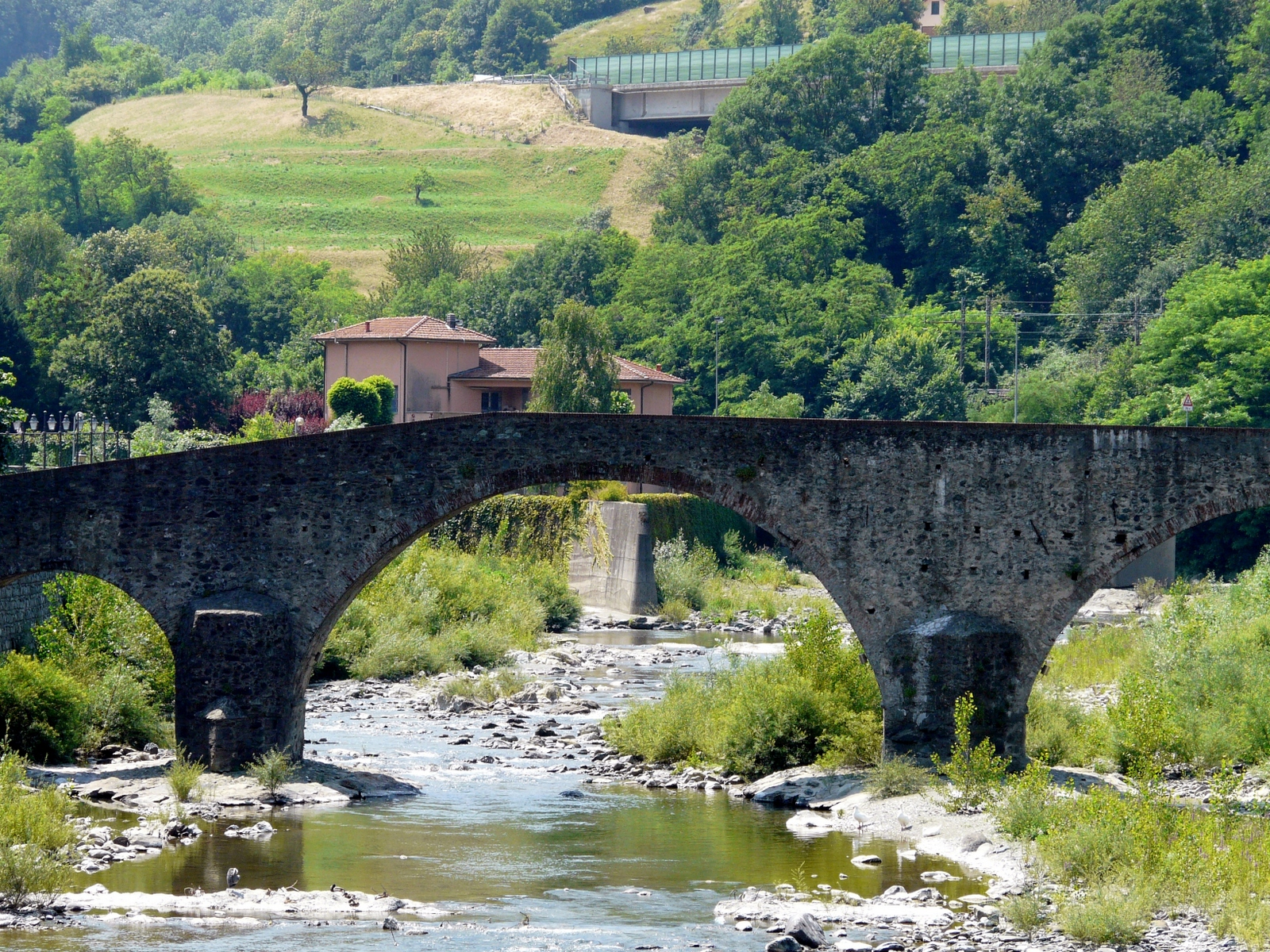 Ponte San Michele, Campo Ligure, Liguria, Italia